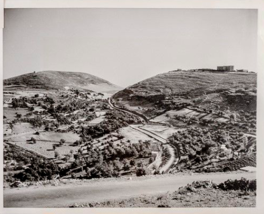 פסגת הר כנען (מימין), 1946. בראש ההר ניתן לראות את הבתים שבנתה שרה לוי, ואת בית המלון הגדול.